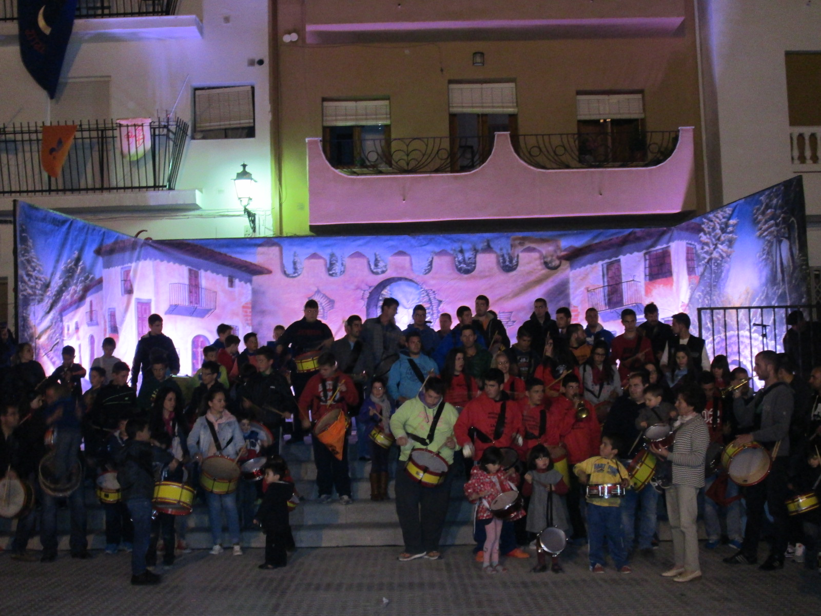 Fiestas de Moros Cristianos y Diablos de Zújar centenares de tambores en el pasacalles nocturno son el preludio de las Fiestas